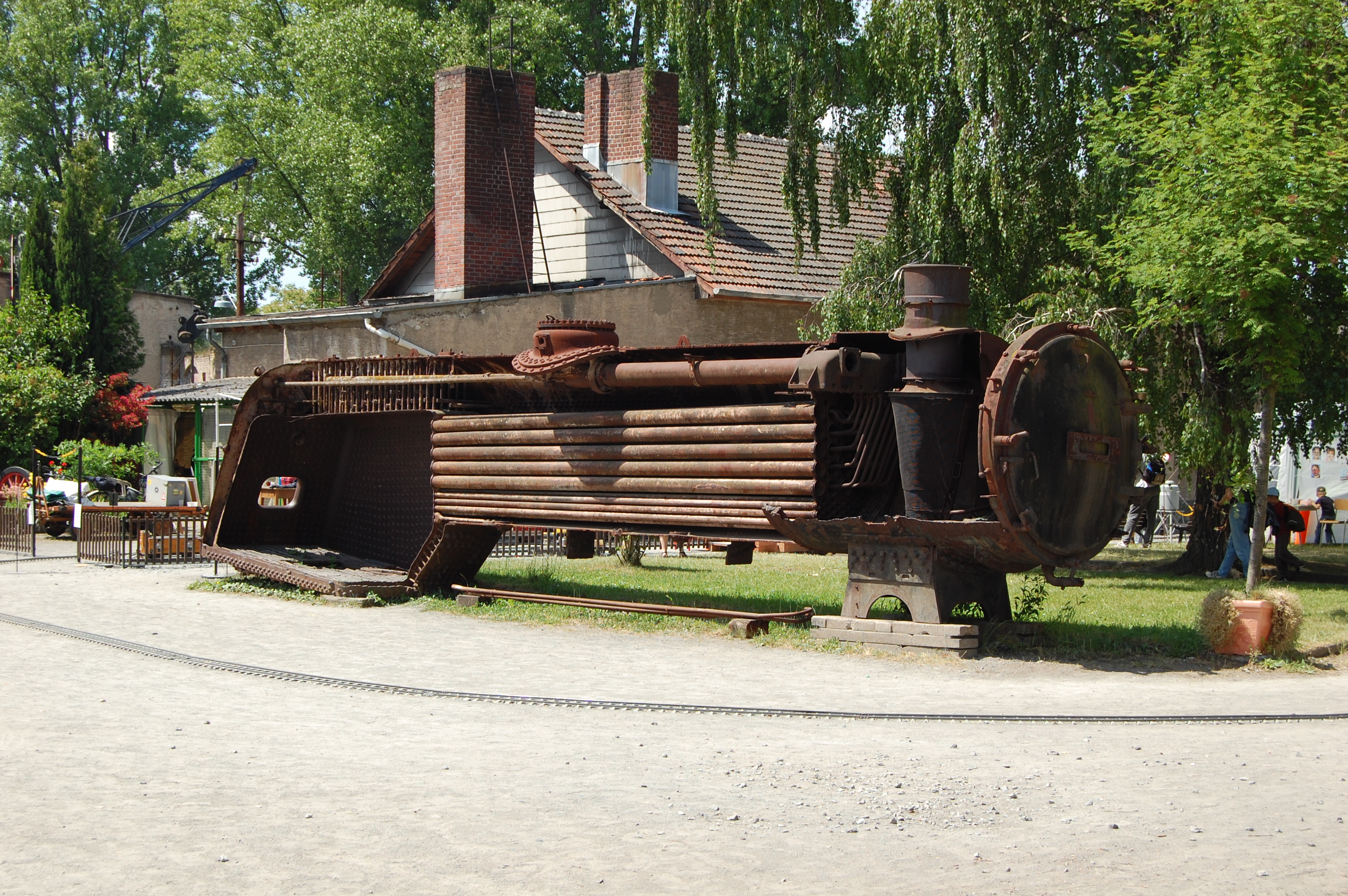 Aufgeschnittener Kessel einer Dampflokomotive (Baureihe 50)